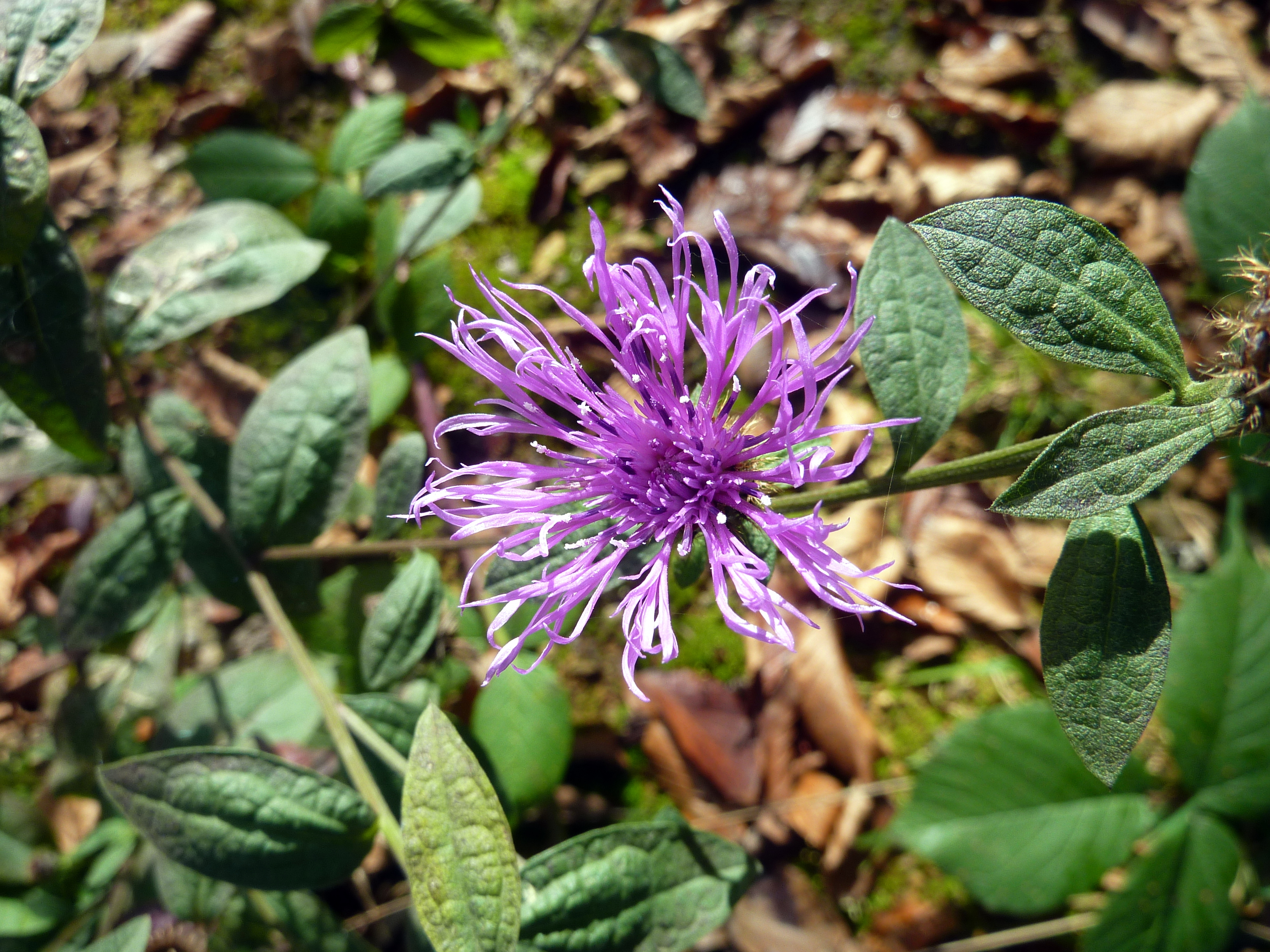 Centaurea salicifolia